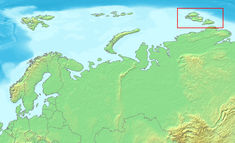 Severnaya_Zemlya